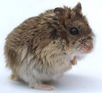 Гибридов отличают по своеобразному строению, не свойственному оттенку и типу шерсти для данного вида.